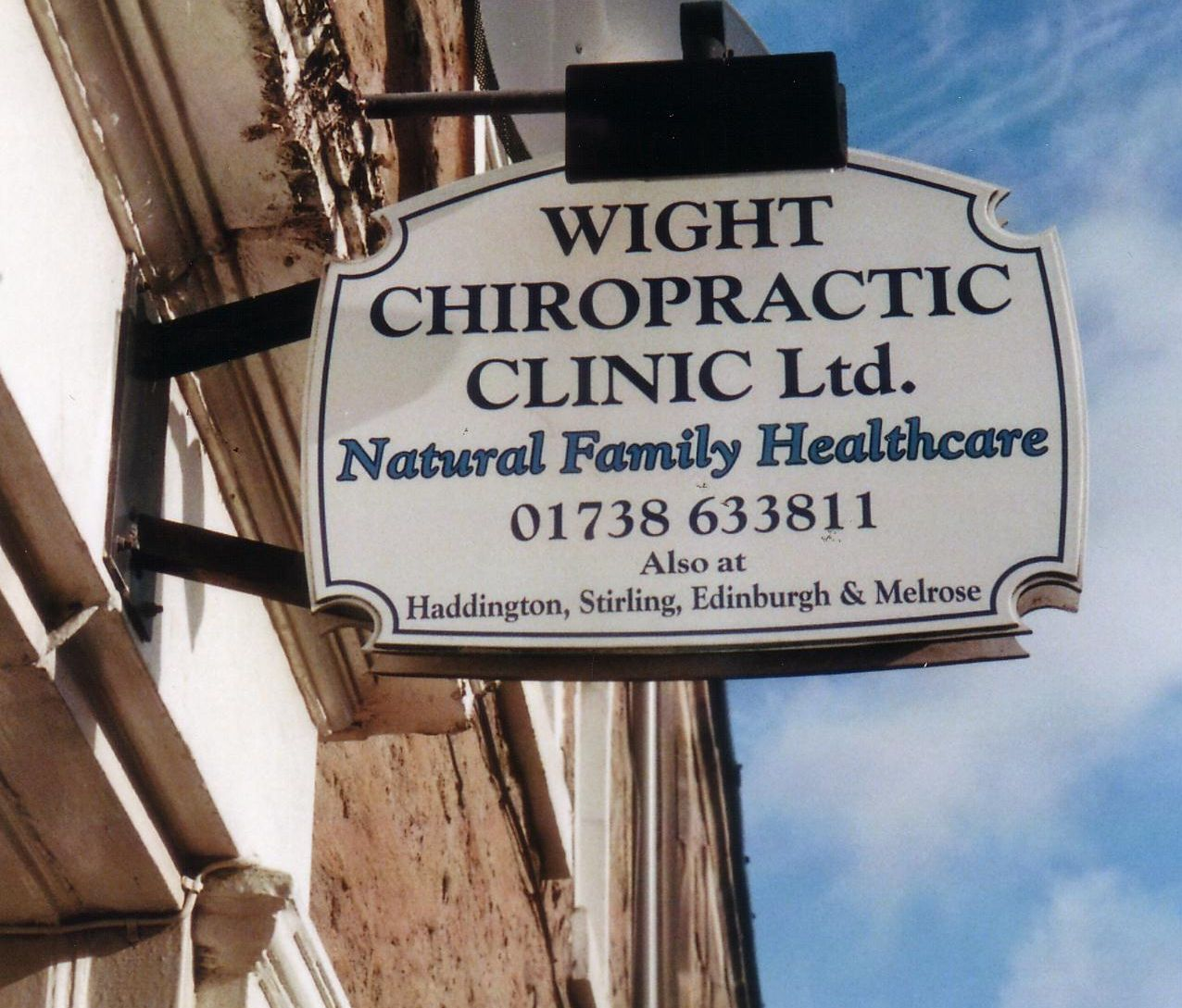 Reklameschild einer chiropraktischen Klinik in Perth, Schottland